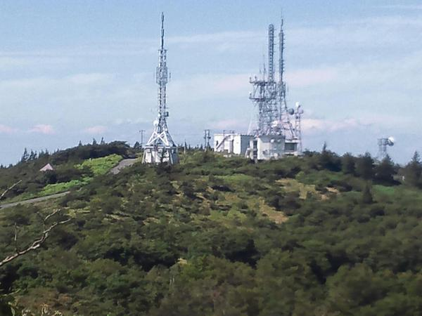 折爪岳頂上部